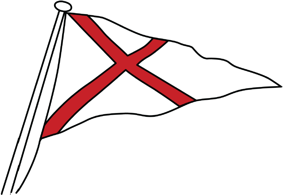 Licensing: == This image shows a flag, a coat of arms, a seal or some other official insignia. The use of such symbols is restricted in many countries. These restrictions are independent of the copyright status.